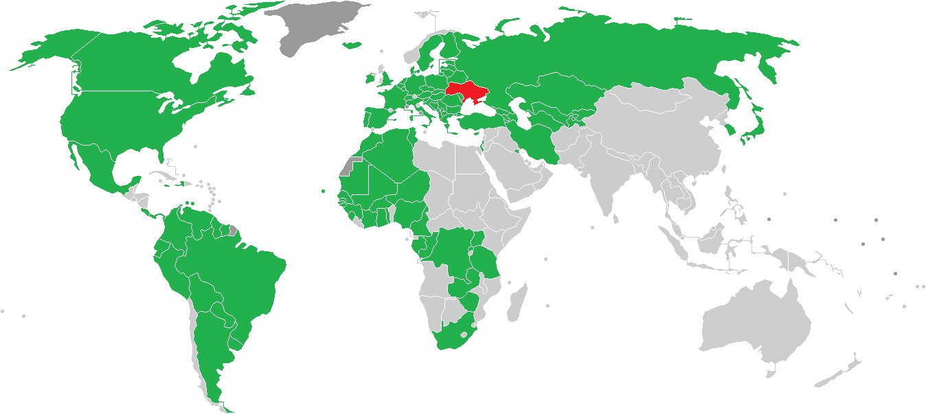 Громадянство гравців, що виступали в українській вищій та Прем'єр-лізі України